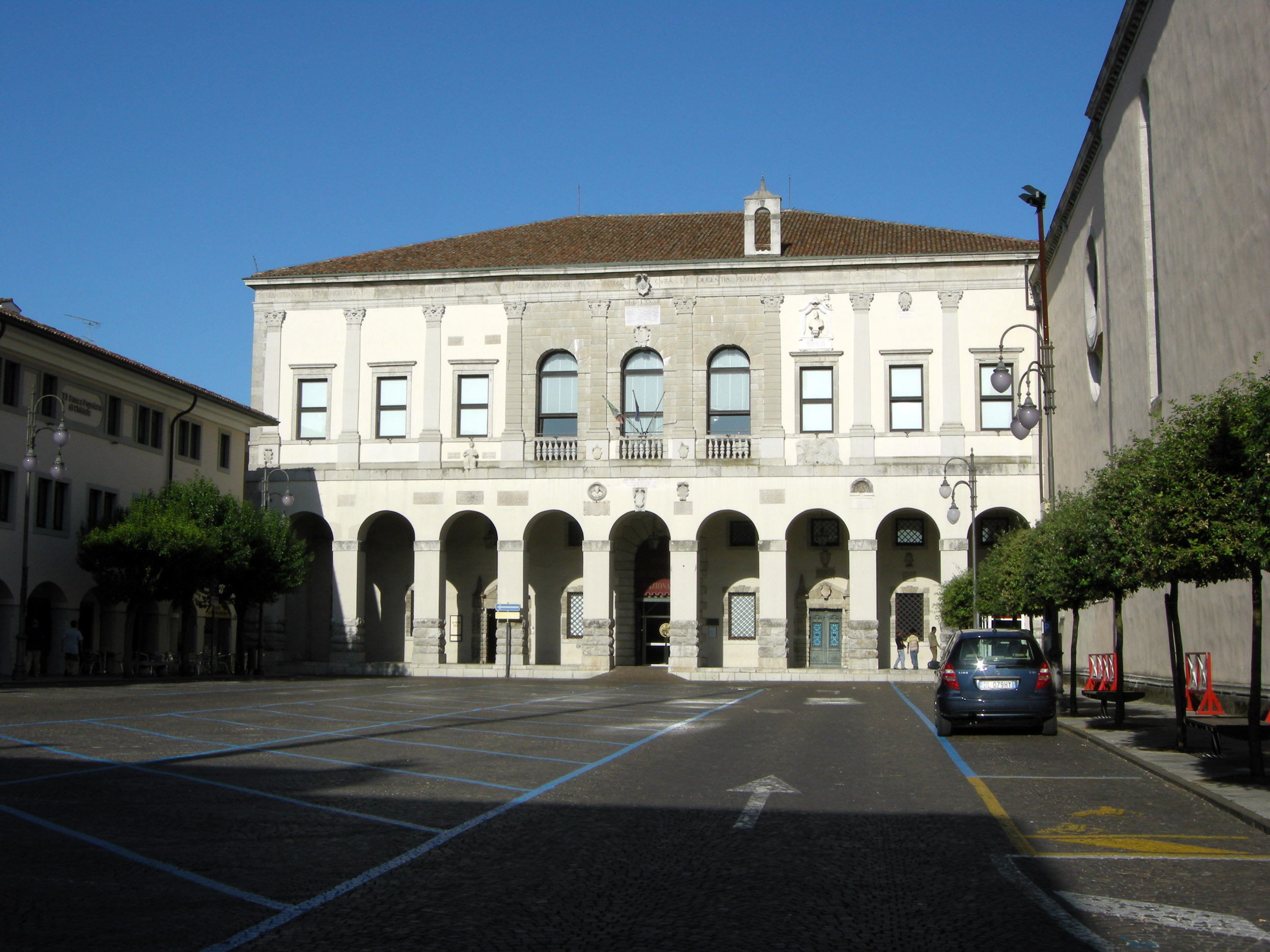 Cividale, man, esterno, palazzo palladio